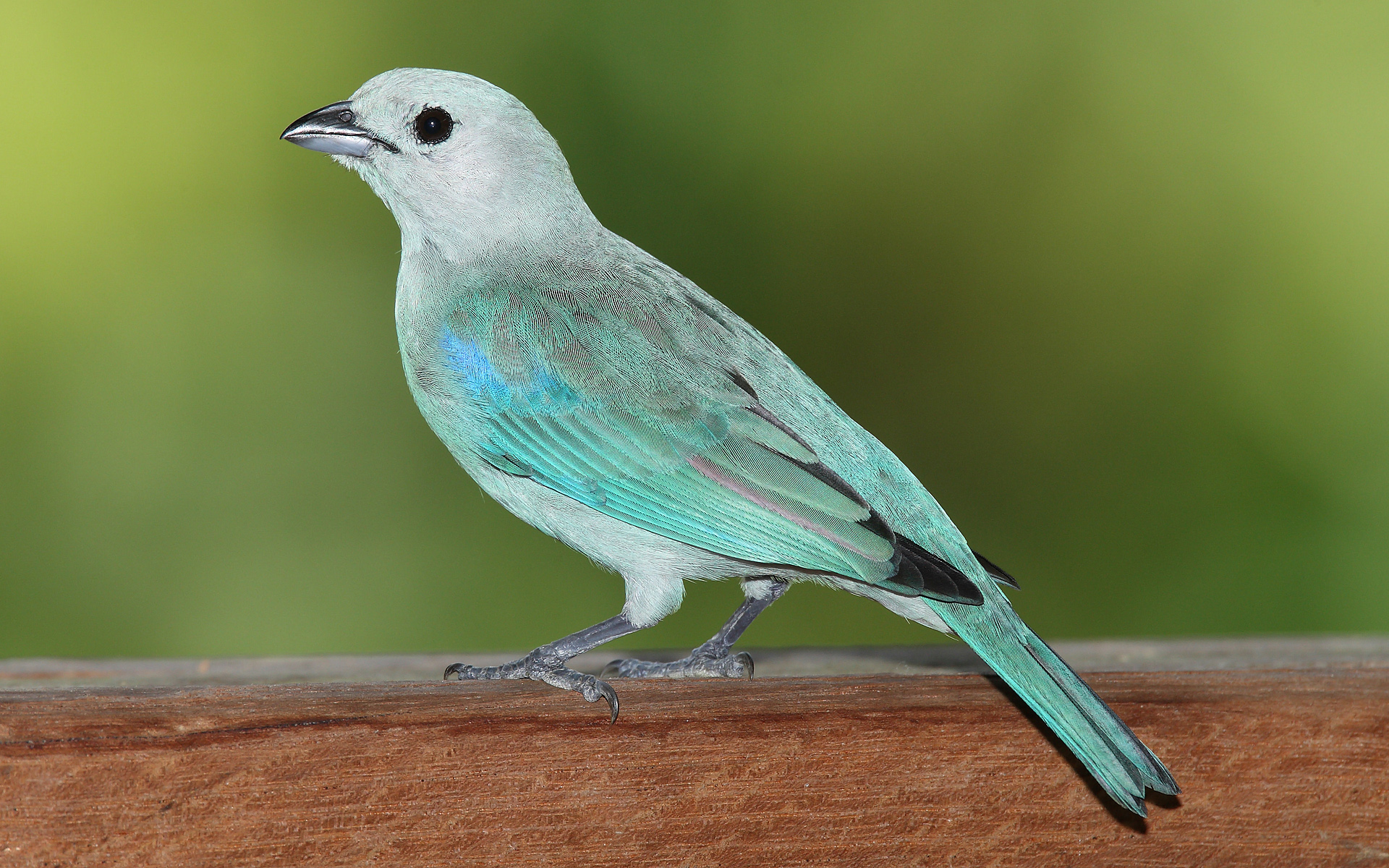 Blue-gray Tanager (Thraupis episcopus) -- Parque Nacional Darién, Panamá -- 2008 February